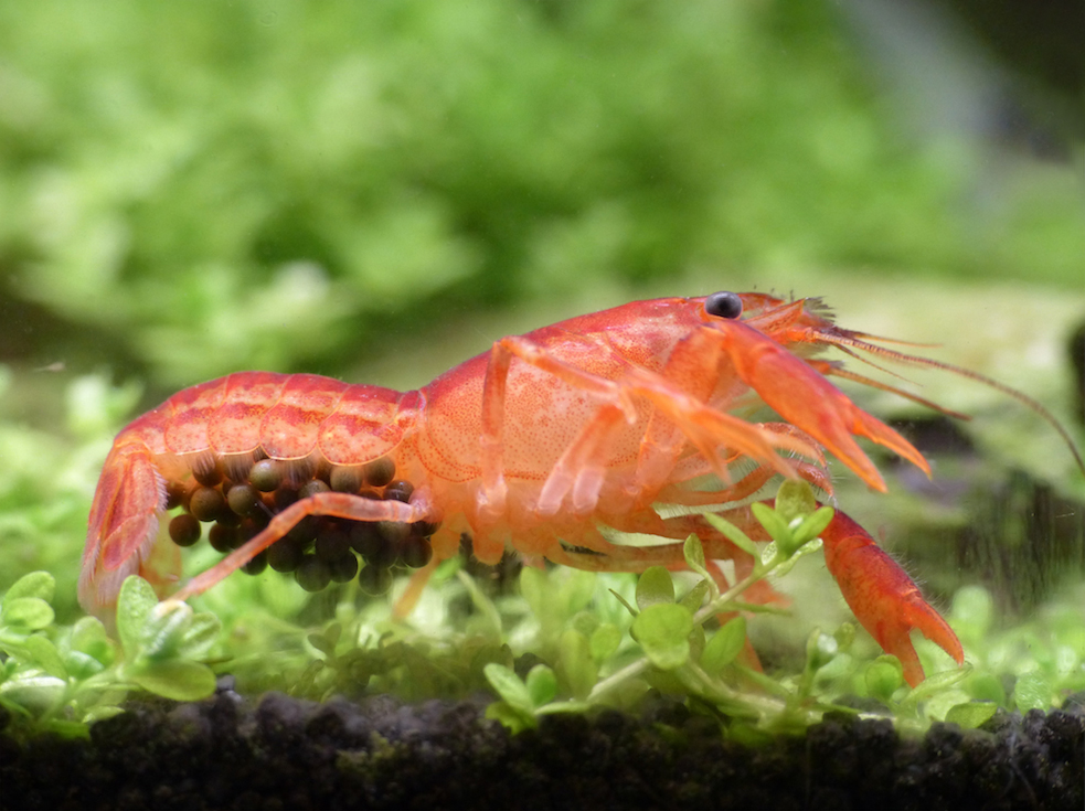 Cambarellus patzcuarensis sp. Orange: ein Weibchen mit Eiern